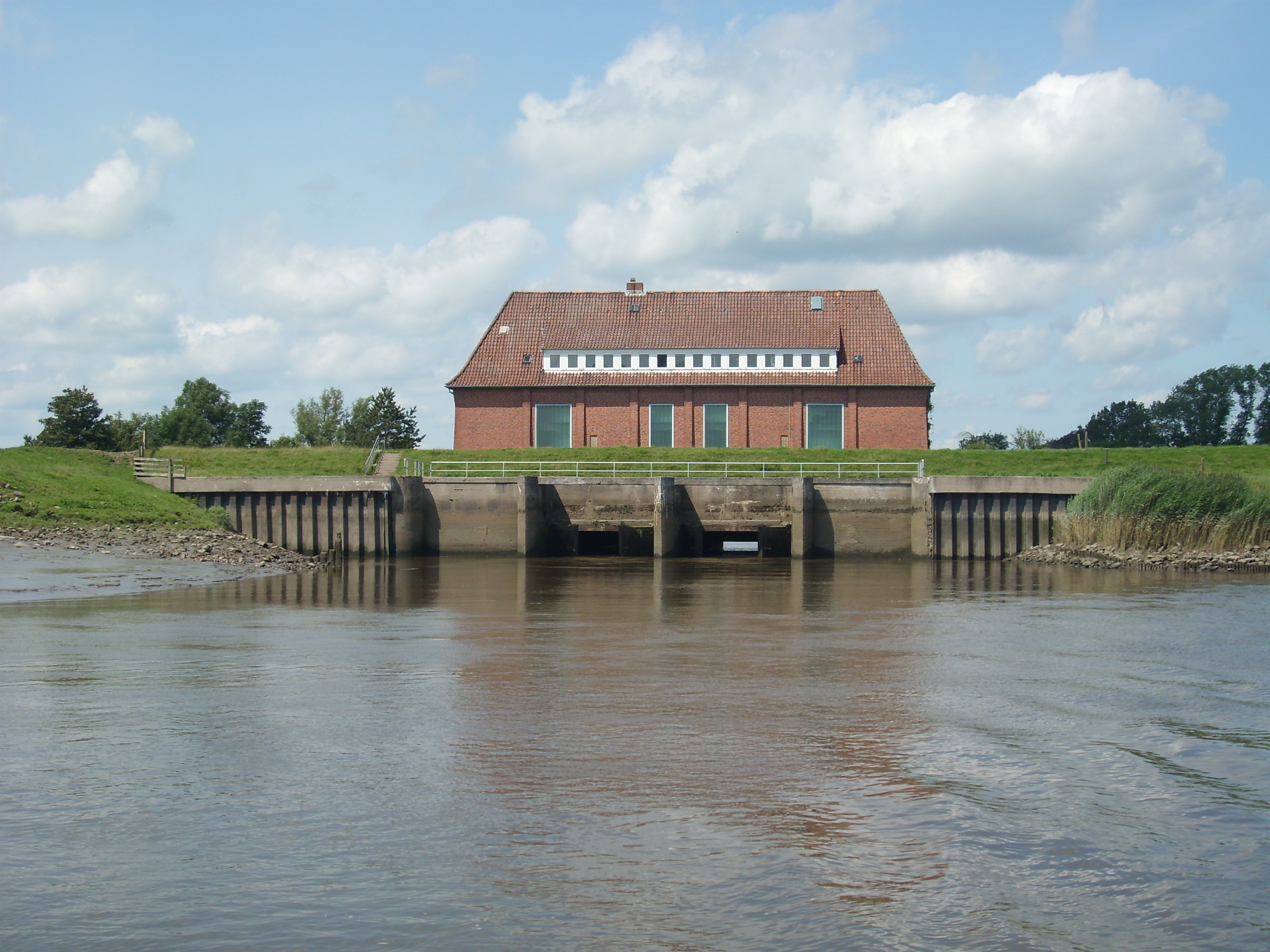 Das Hauptschöpfwerk Bekmünde, über das die Bekau in die Stör mündet, von der Stör aus gesehen